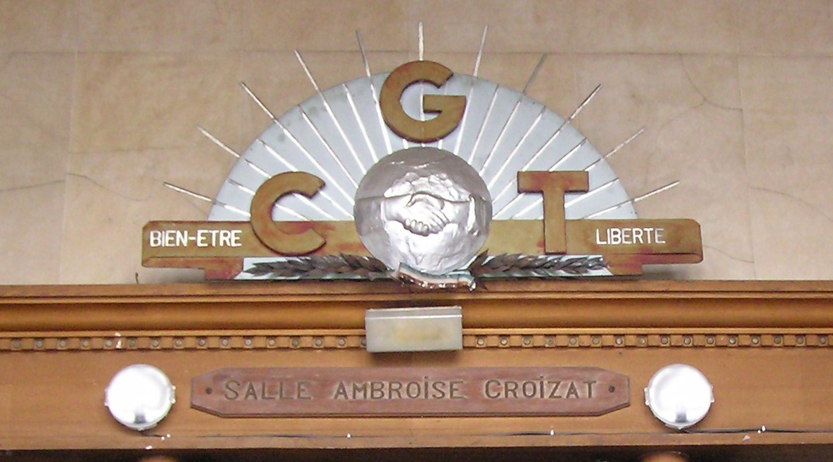 Bordeaux Bourse du Travail art déco entrée salle Ambroize Croizat